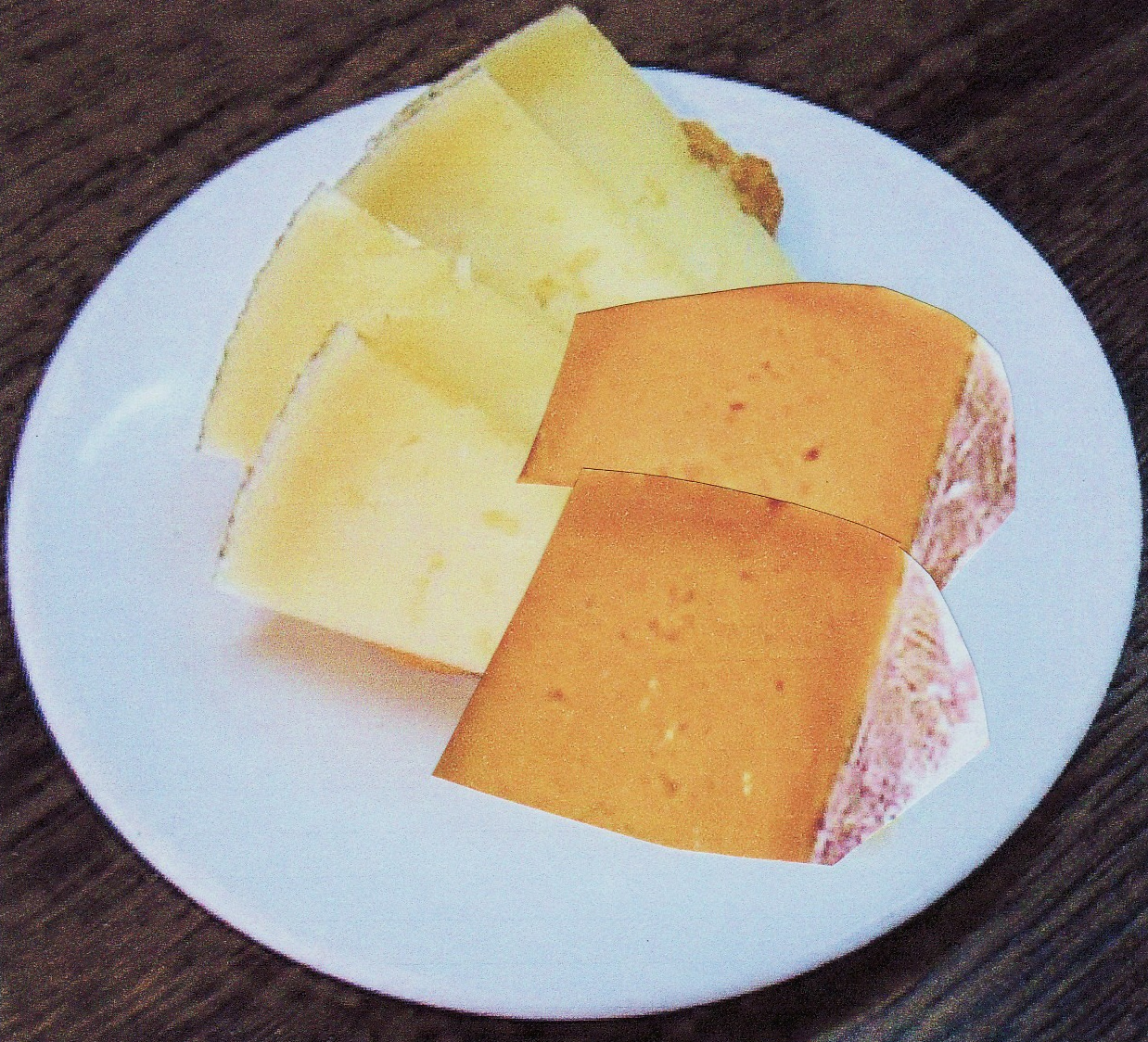 Plato con diferente quesos cerrateños.